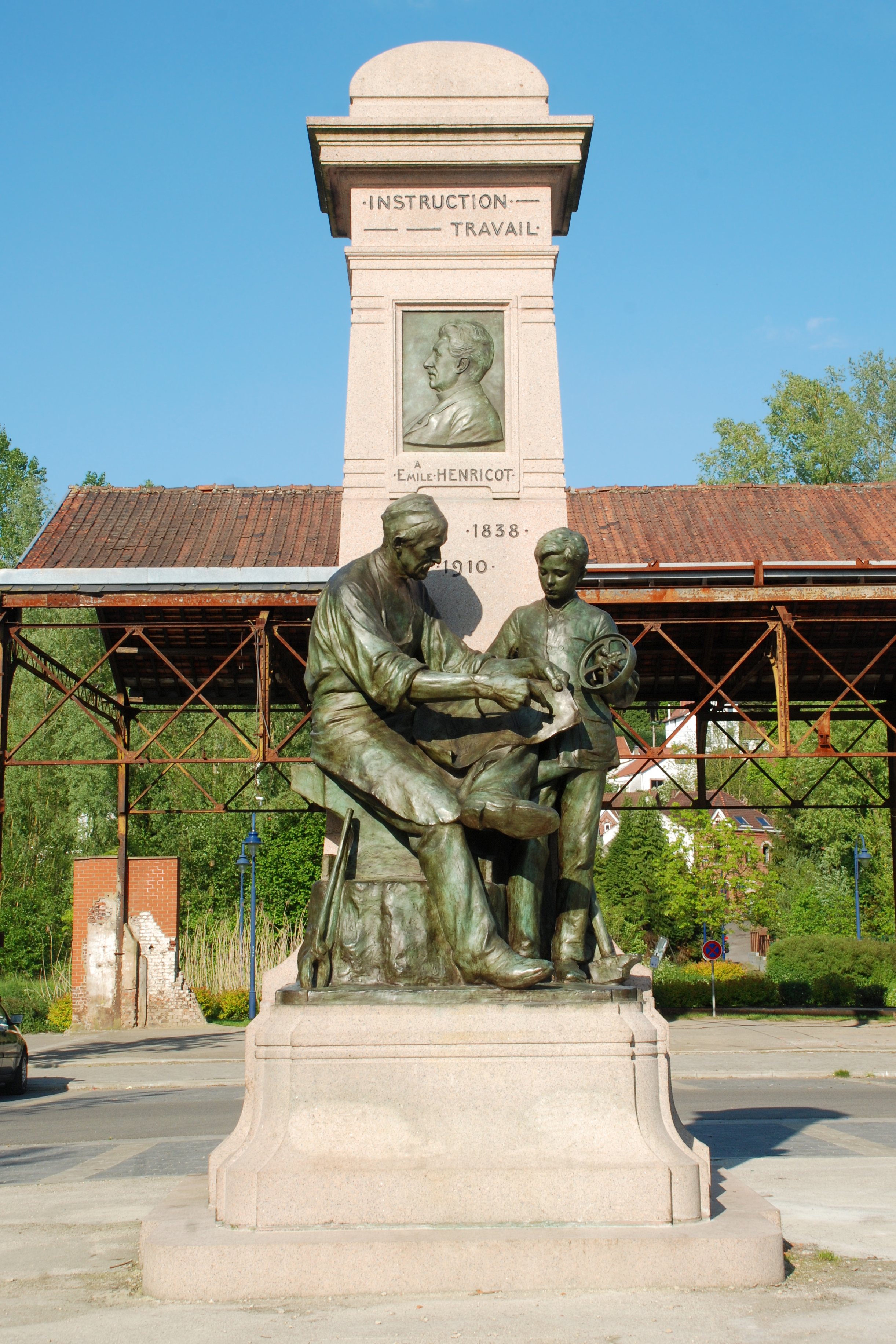 Belgique - Brabant wallon - Court-Saint-Etienne - Monument à Émile Henricot